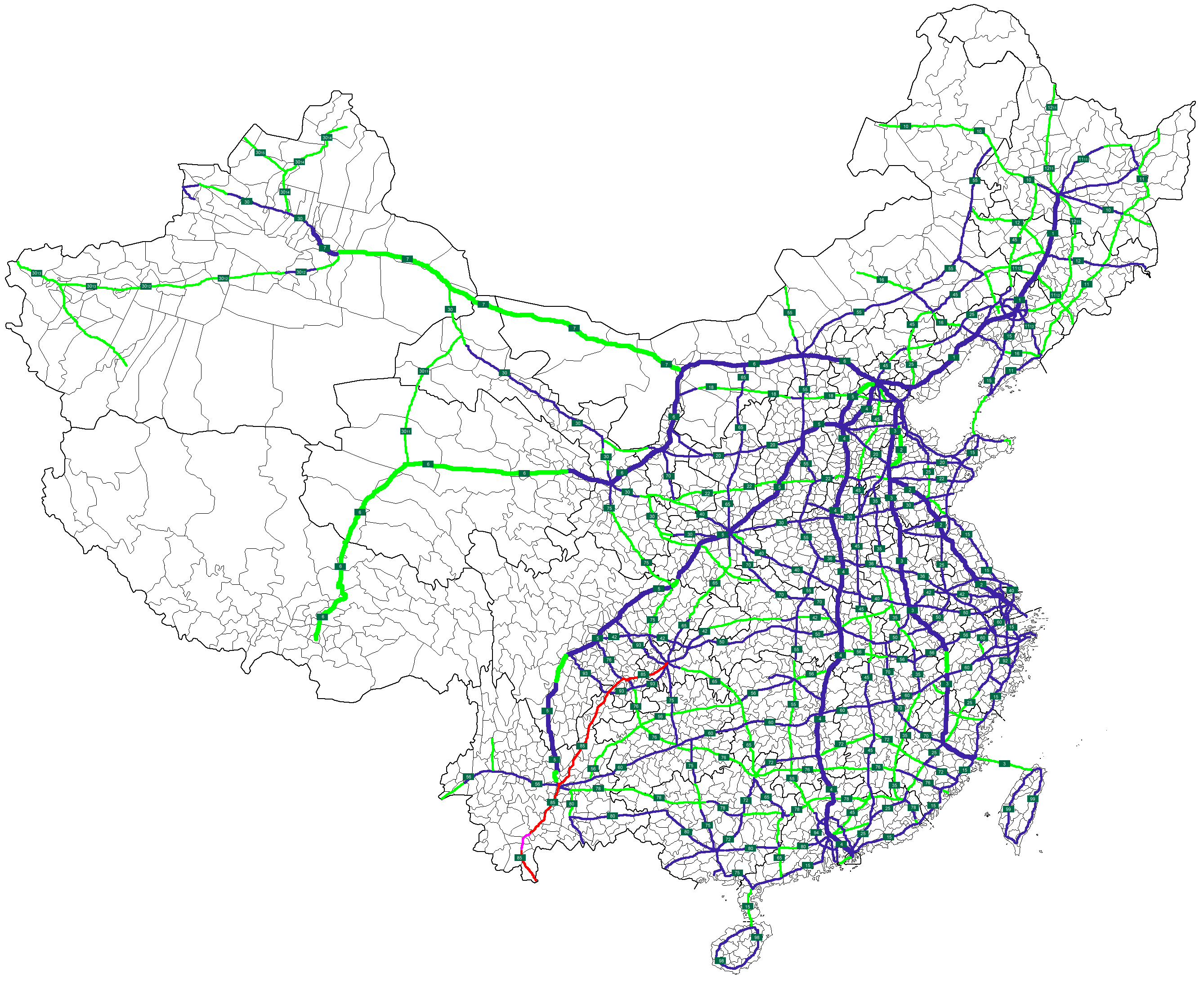 Source file(Map of NTHS Expressways of China.png) was uploaded ASDFGH at en.wikipedia. Later version(s) were uploaded by Nima Farid at en.wikipedia. Modification for NTHS Expressway G85 is my own work.